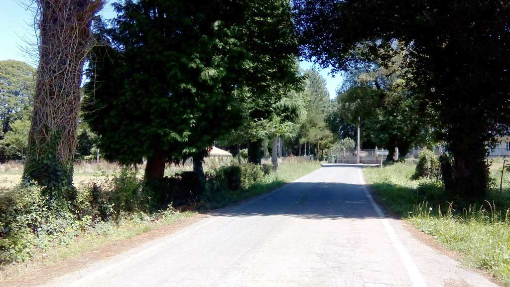 Vista das Orxas, Curtis.